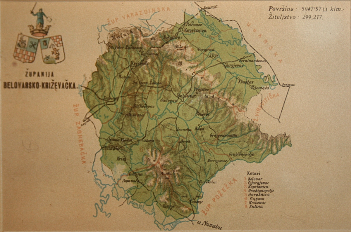 Zemljovidi županija na razglednicama oko 1900. godine, snimljeno tijekom Noći muzeja